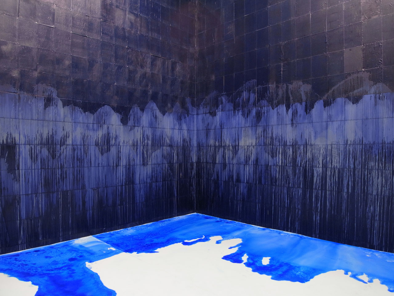 Latifa Echakhch, A chaque stencil une révolution, 2007